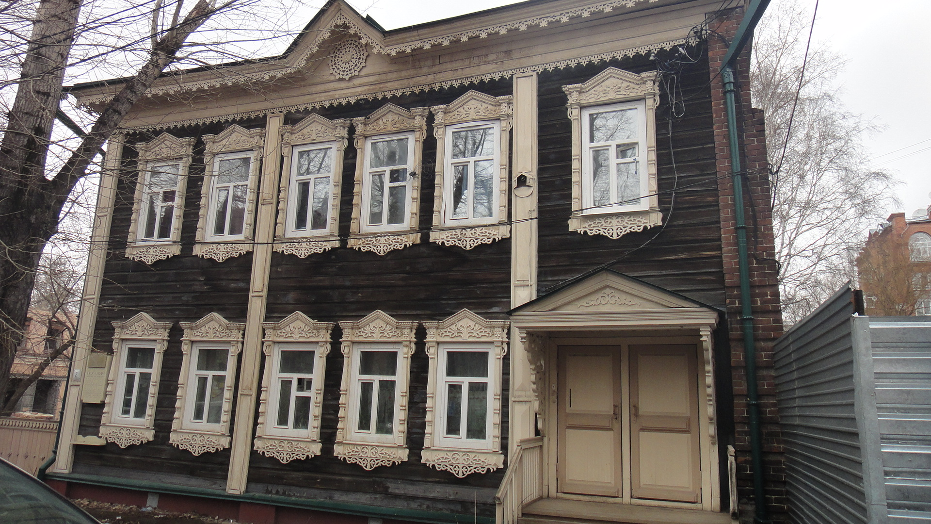 Дом, в котором родился Михаил Посохин. Ул. Карташова, 2, Томск.